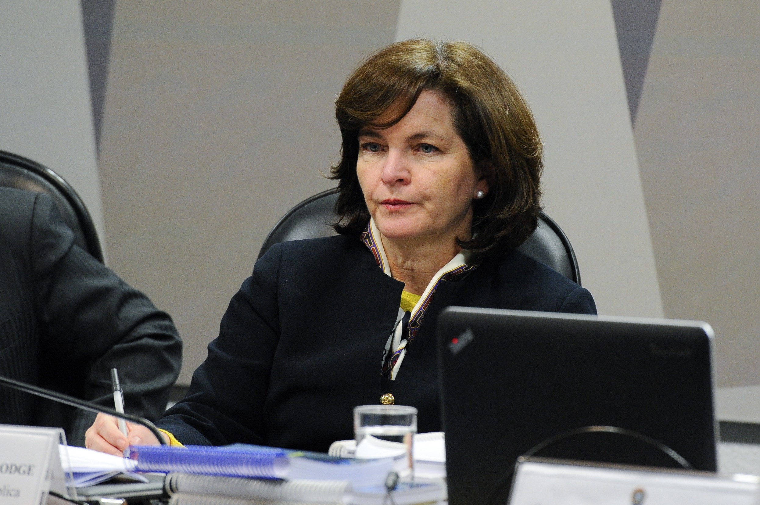 Comissão de Constituição, Justiça e Cidadania (CCJ) realiza sabatina de Raquel Dodge, indicada para o cargo de procuradora-geral da República. À mesa, subprocuradora-geral da República, Raquel Elias Ferreira Dodge. Foto: Marcos Oliveira/Agência Senado